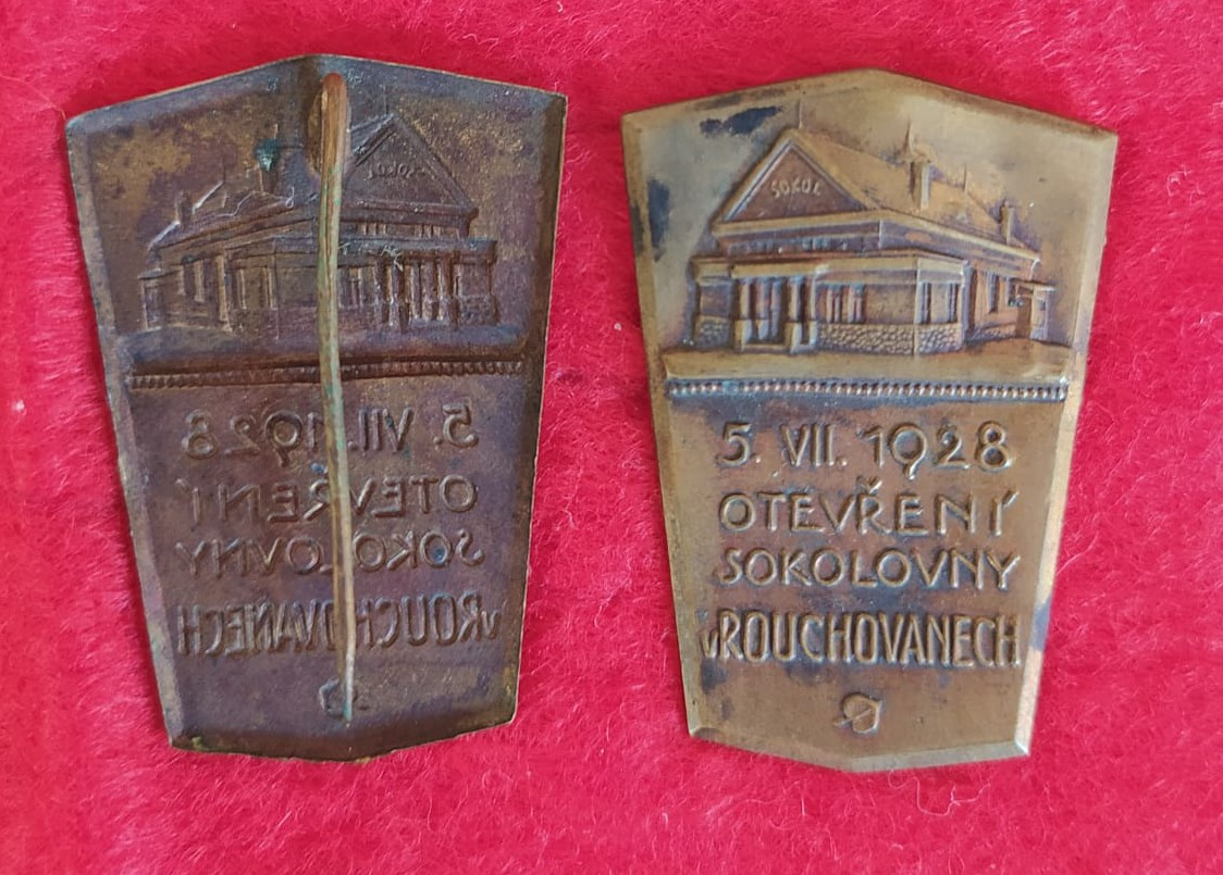 odznak k otevření sokolovny v Rouchovanech 1928